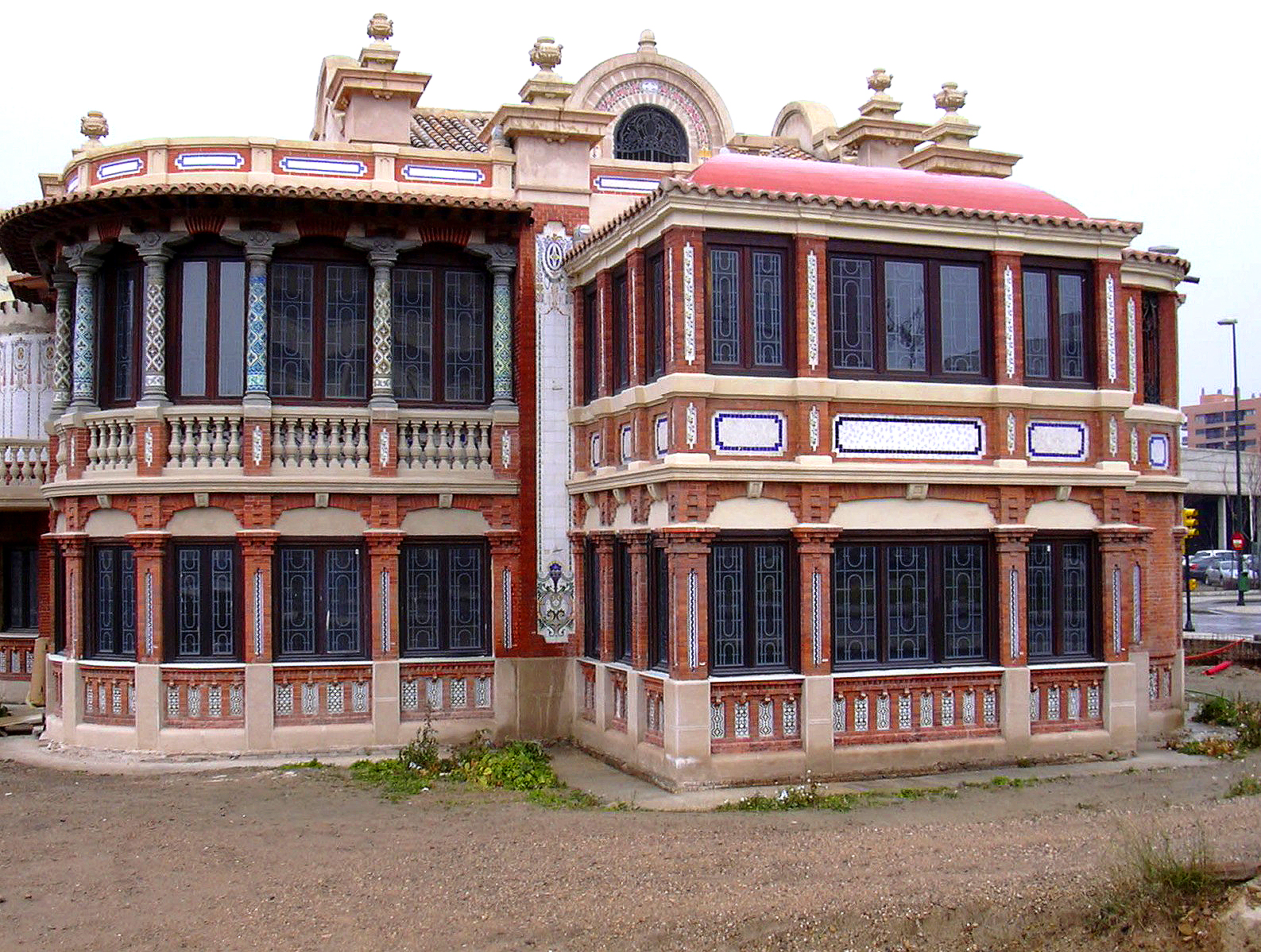 Chalé de Don Juan Solans en Zaragoza. Ejemplo de arquitectura ecléctica privada